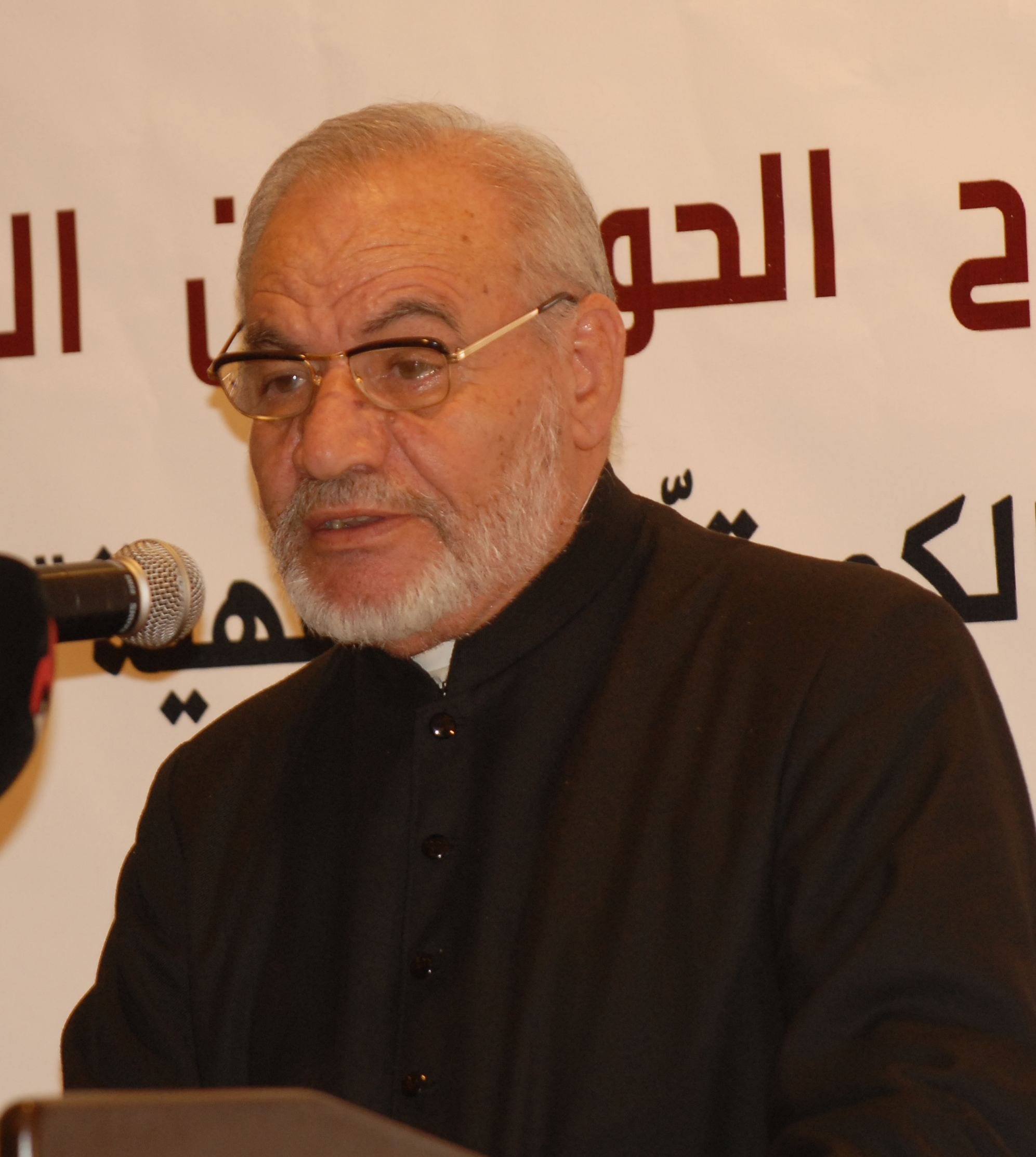 Père Suhail Qasha الأب سهيل قاشا